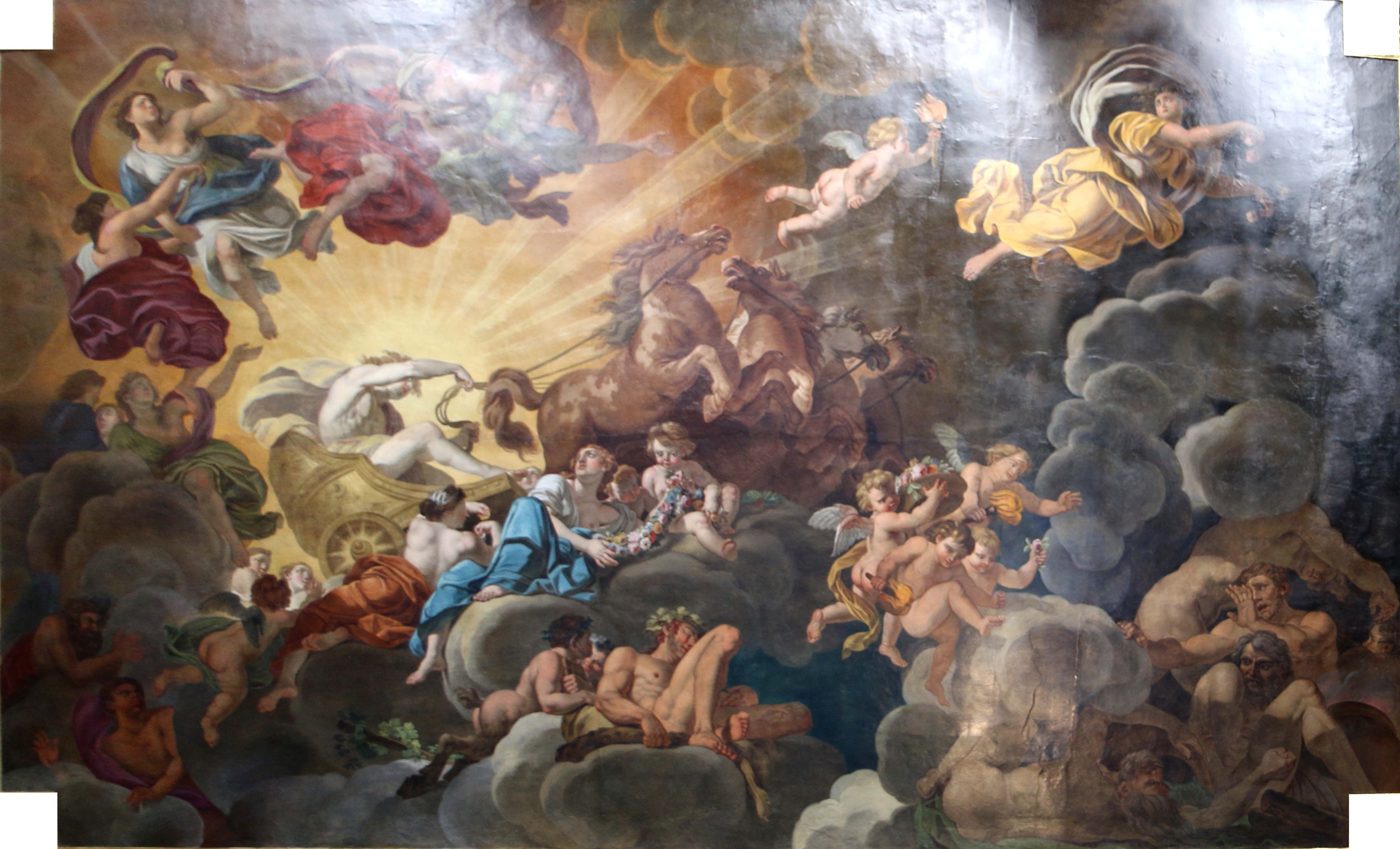 Peinture de Louis Chaix représentant Apollon sur son char.